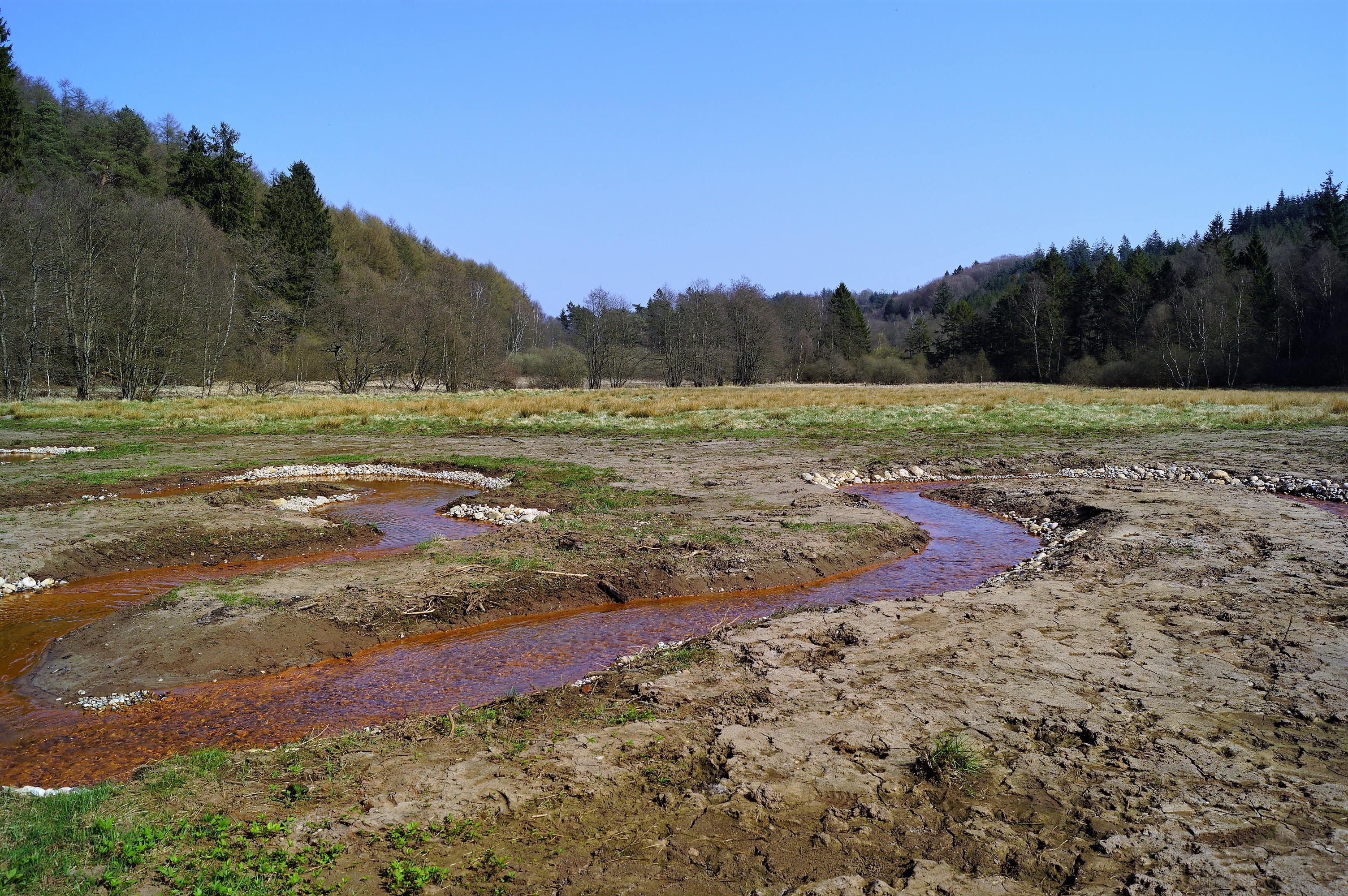 Jenskær set mod øst fra Gjessø Savværk